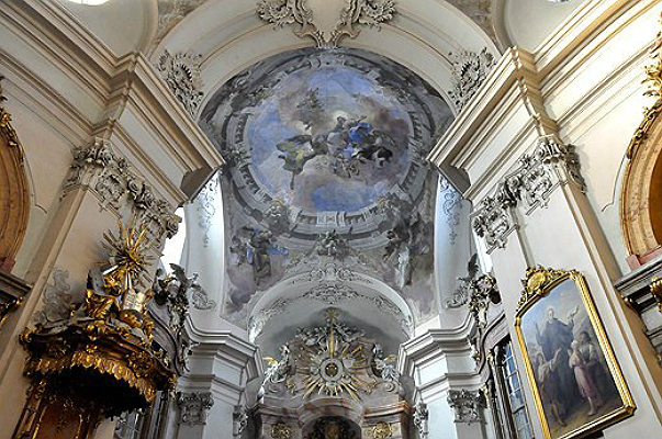 Piaristenkirche Wien, Inennraum mit Maulbertsch-Fresken